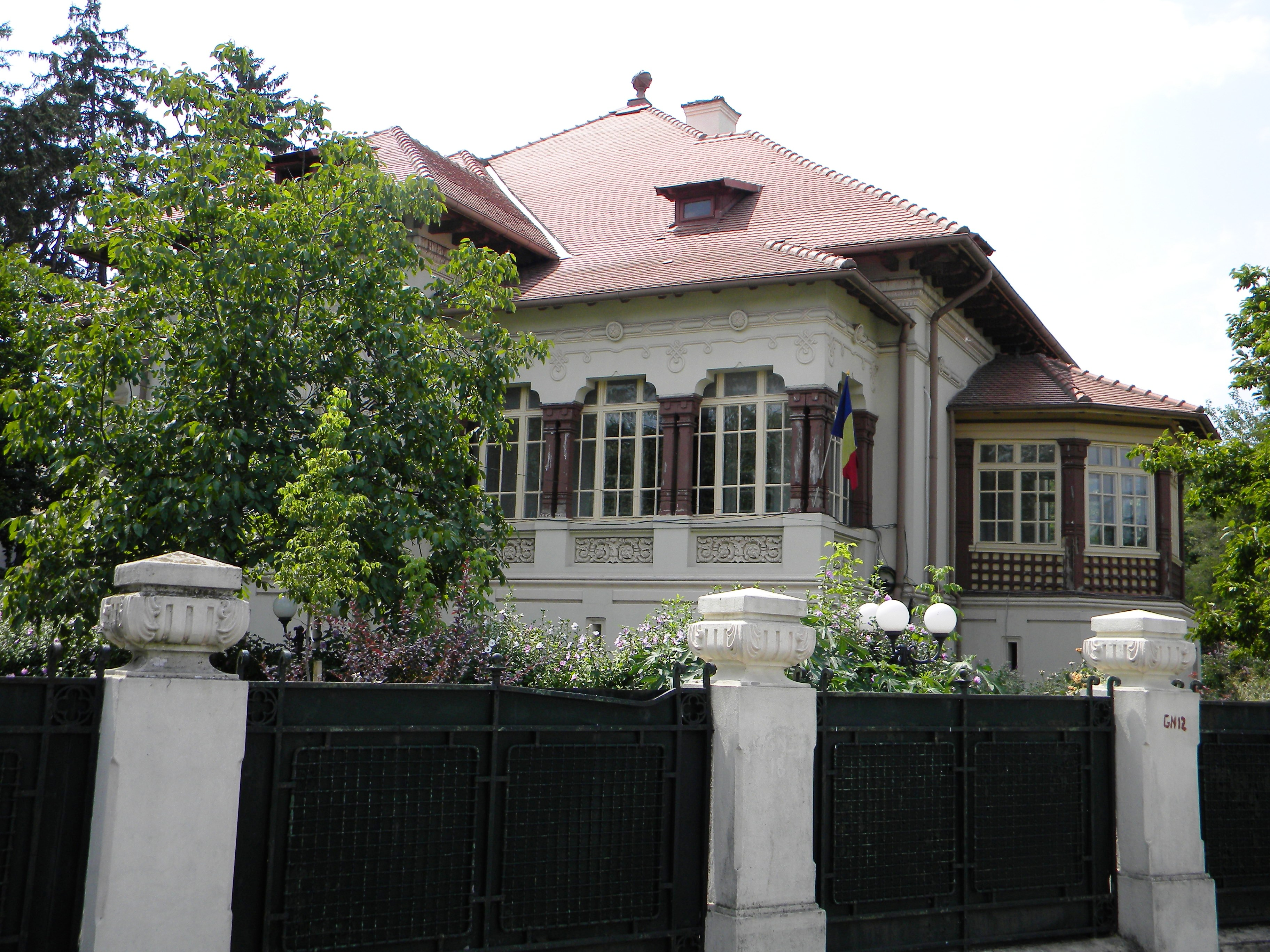 Casa Sos. Kiseleff nr. 57, Bucuresti, sect. 1